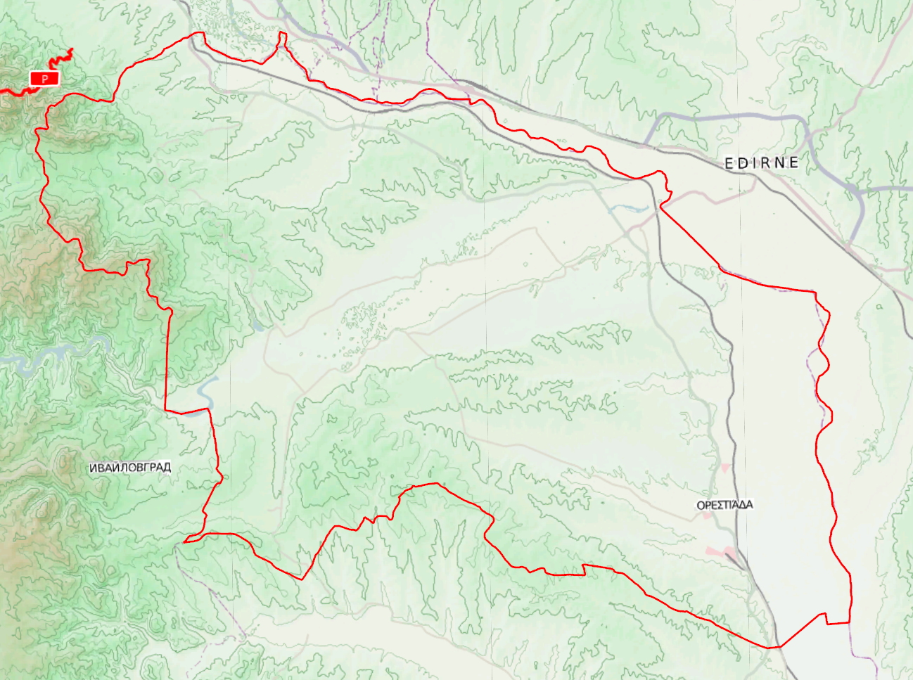 Τοπογραφικός χάρτης του Δήμου Ορεστιάδας (2011)